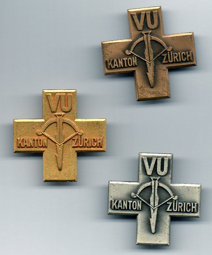 Abzeichen des freiwilligen militärischen Vorunterichts in Bronze, Silber und Gold, Schweiz